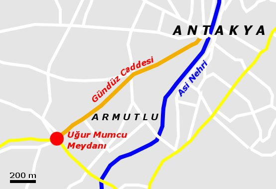 Zentrale Orte der Proteste 2013 in Antakya bzw. Antakya-Armutlu